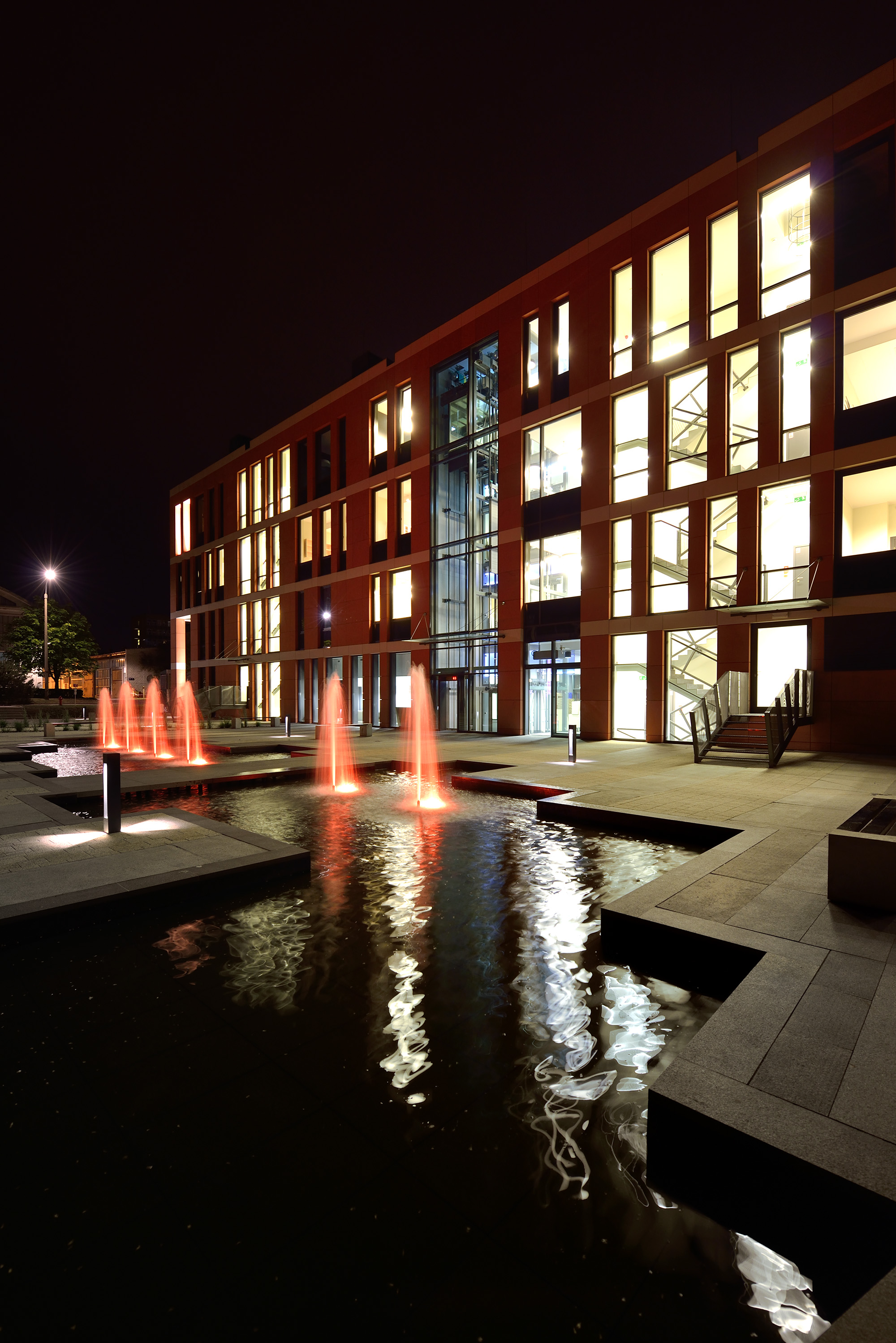 Budynek Nanotechnologii B Politechniki Gdańskiej